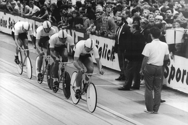 S. Blochwitz, D. Meier, T. Will, J. Pawalozyk ADN-ZB Settnik 20.12.87-Ge. Berlin: Winterbahn - Bei den DDR-Hallenmeisterschaften im Radsport in der Werner-Seelenbinder-Halle gewann der SC Cottbus des 4000 m-Mannschaftsverfogungsrennen. Im Finale erreichten Steffen Blochwitz, Dirk Meier, Thomas Will und Jörg Pawalozyk als erstes Quartett in der Winterbahngeschichte eine Zeit unter 4:30 Minuten. (4:29,980).